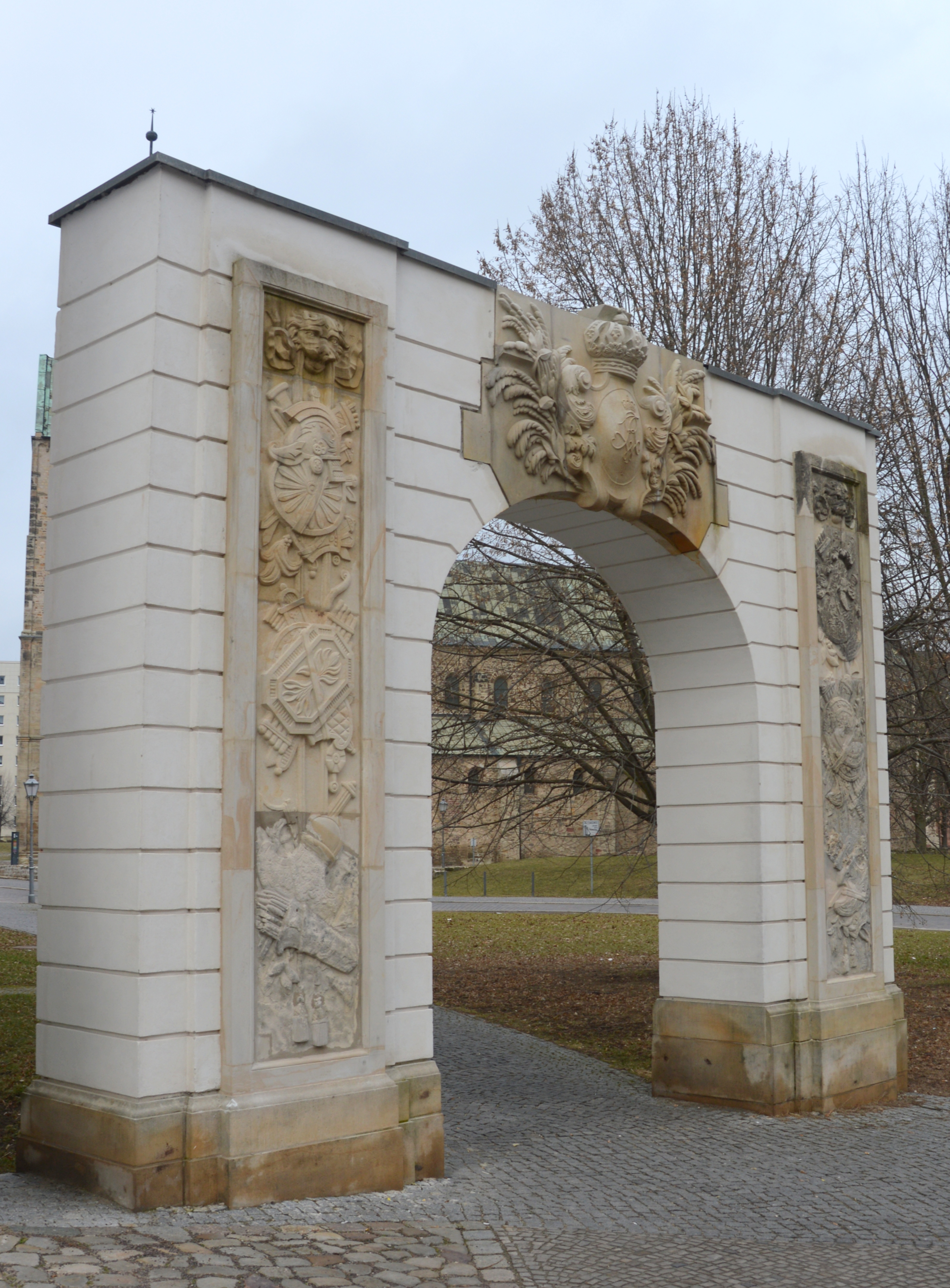 Sterntor Magdeburg